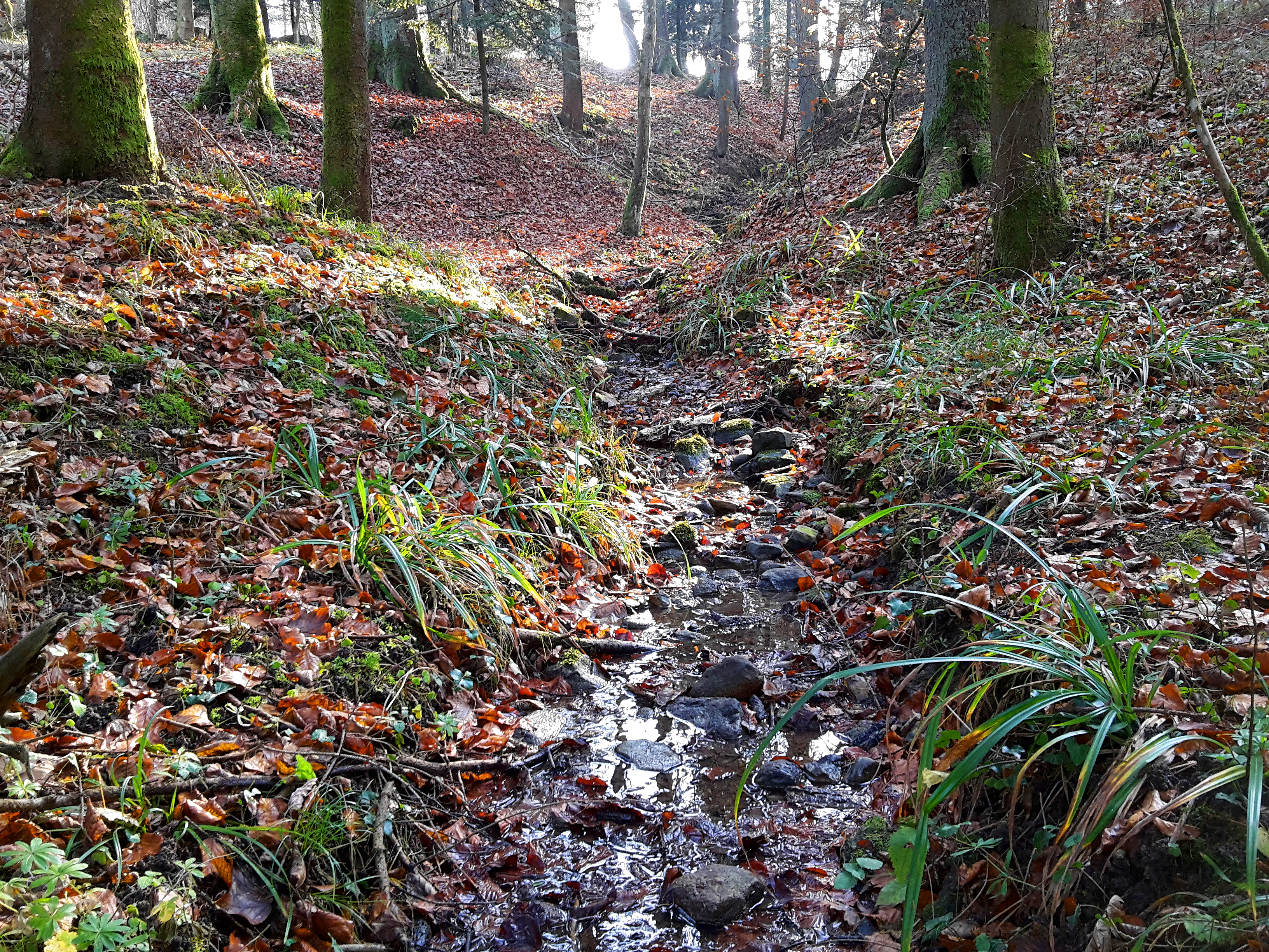 Stoffelbach an der Stoffelbrunnenstrasse kurz nach der Quelle im Waldgebiet Honeret, Dietikon